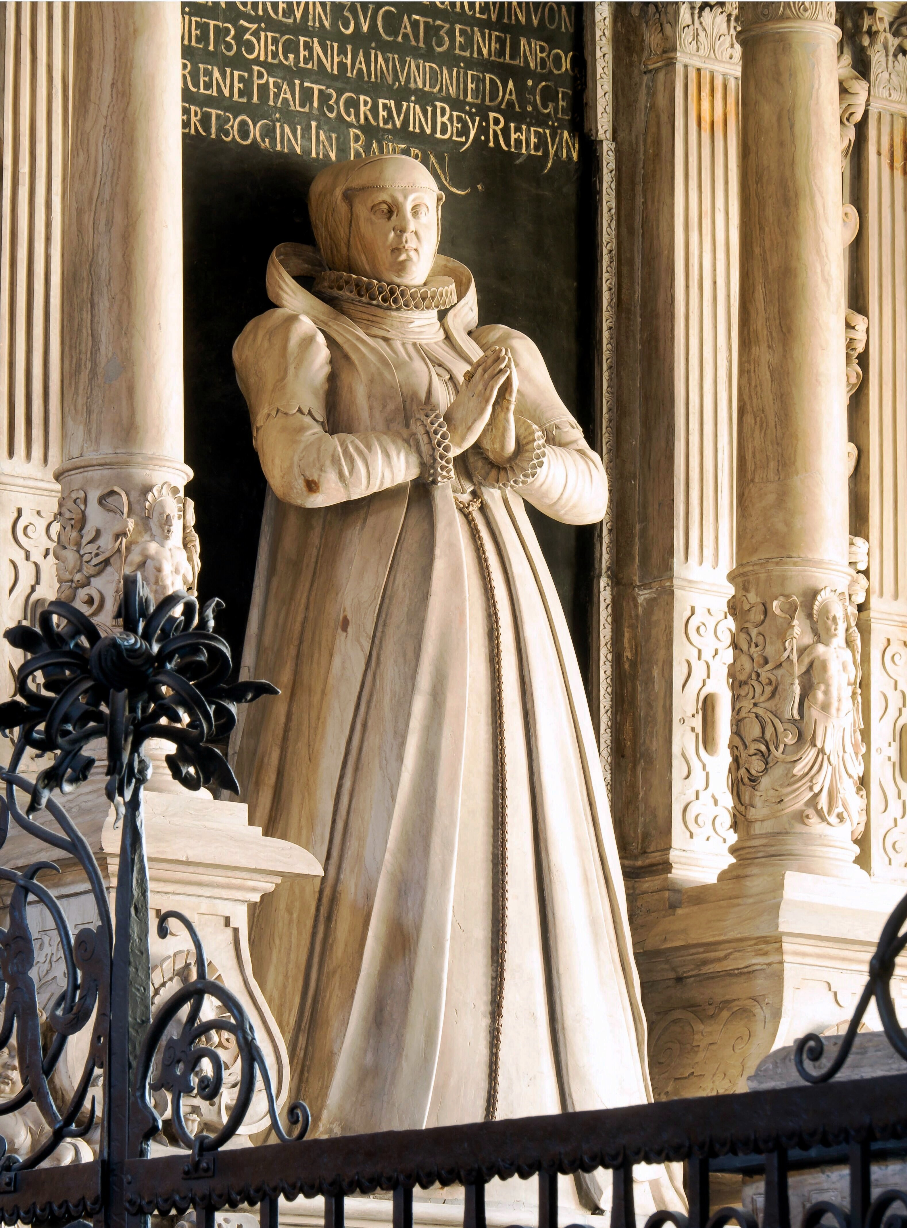 Prunkvolles frühbarockes Grabmal aus Marmor der Landgräfin Anna Elisabeth von Hessen-Rheinfels, geborene Pfalzgräfin von Simmern in einer Kapelle des nördlichen Seitenschiffes der Stiftskirche von St. Goar; errichtet zwischen 1592 und 1599. Künstler ist vermutlich Wilhelm Vernuiken, hessischer Hofbildhauer und -architekt.